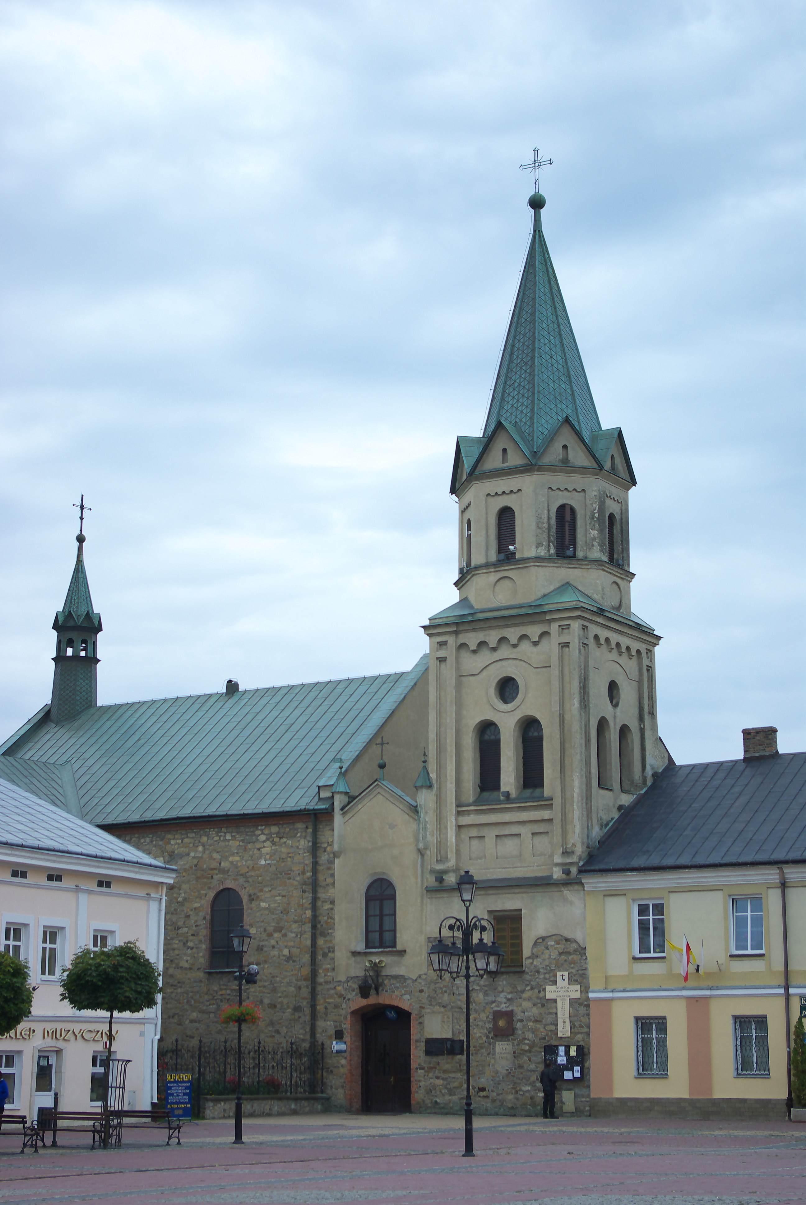 Kościół franciszkanów w Sanoku wraz z przyległymi budynkami